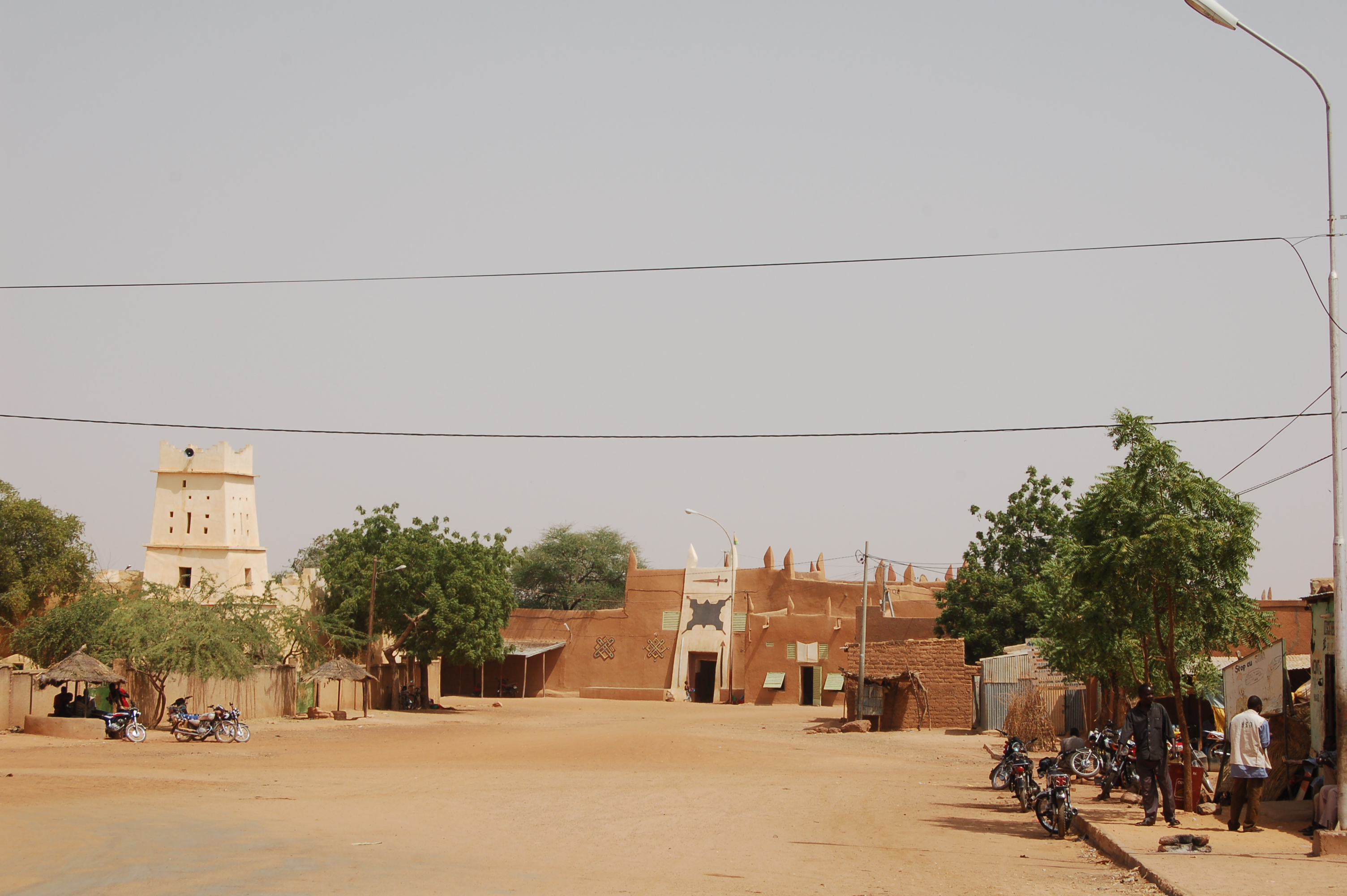 Palais du sultan à Zinder, sultan's palace in Zinder